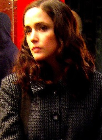 Rose Byrne in New Yorkrosebyrneinnewyork